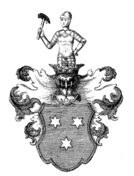 Wappen der Cocceji von Cocq, eines erloschenen preußischen Adelsgeschlechts mit Ursprung in Bremen.